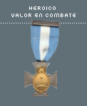 Cruz La Nación Argentina al Heroico Valor en Combate. Ley 22.607 (1982) de la República Argentina.